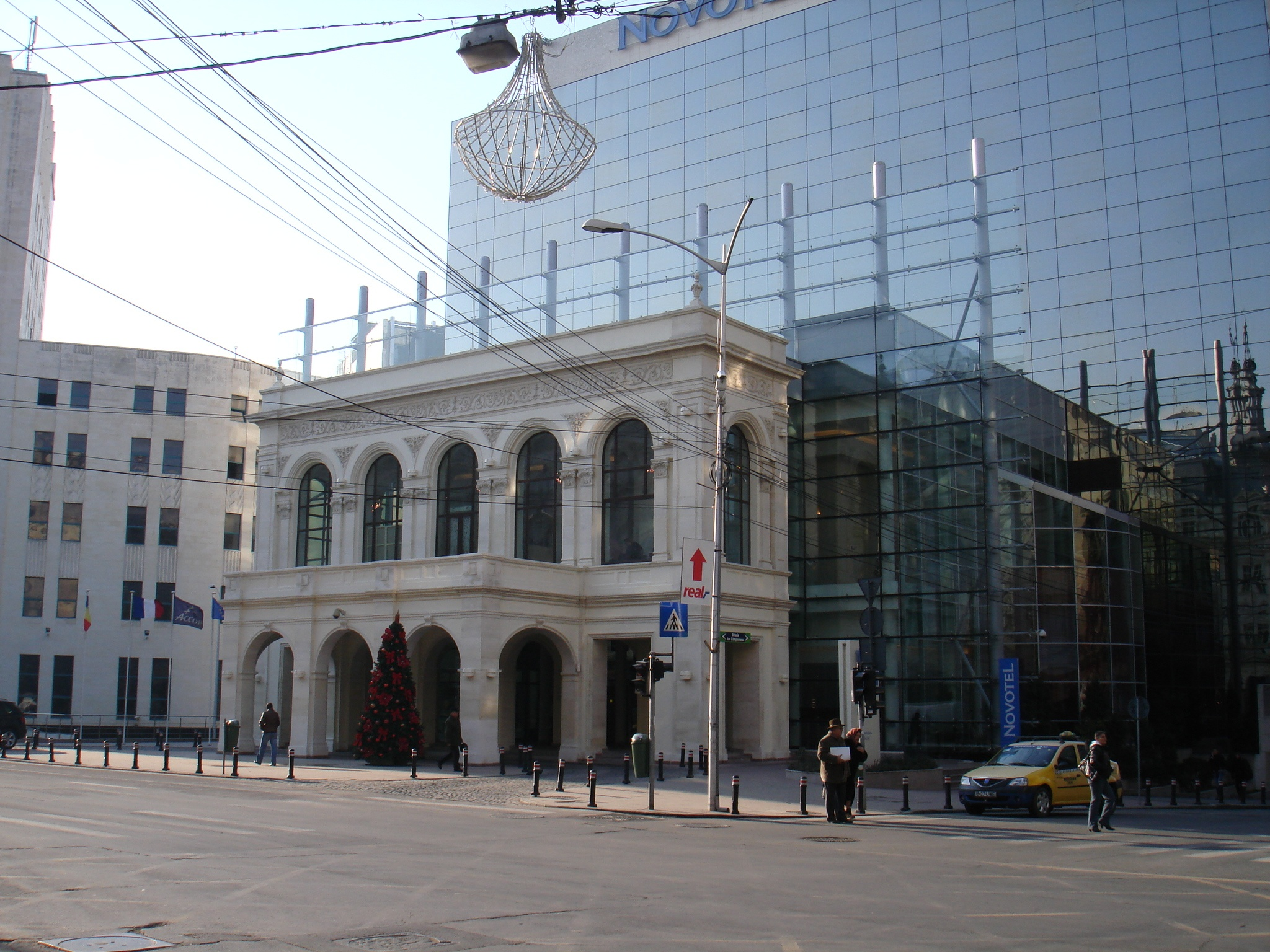 Hotelul Novotel din Bucureşti, a cărui intrare este păstrată din faţada fostului Teatru Naţional.